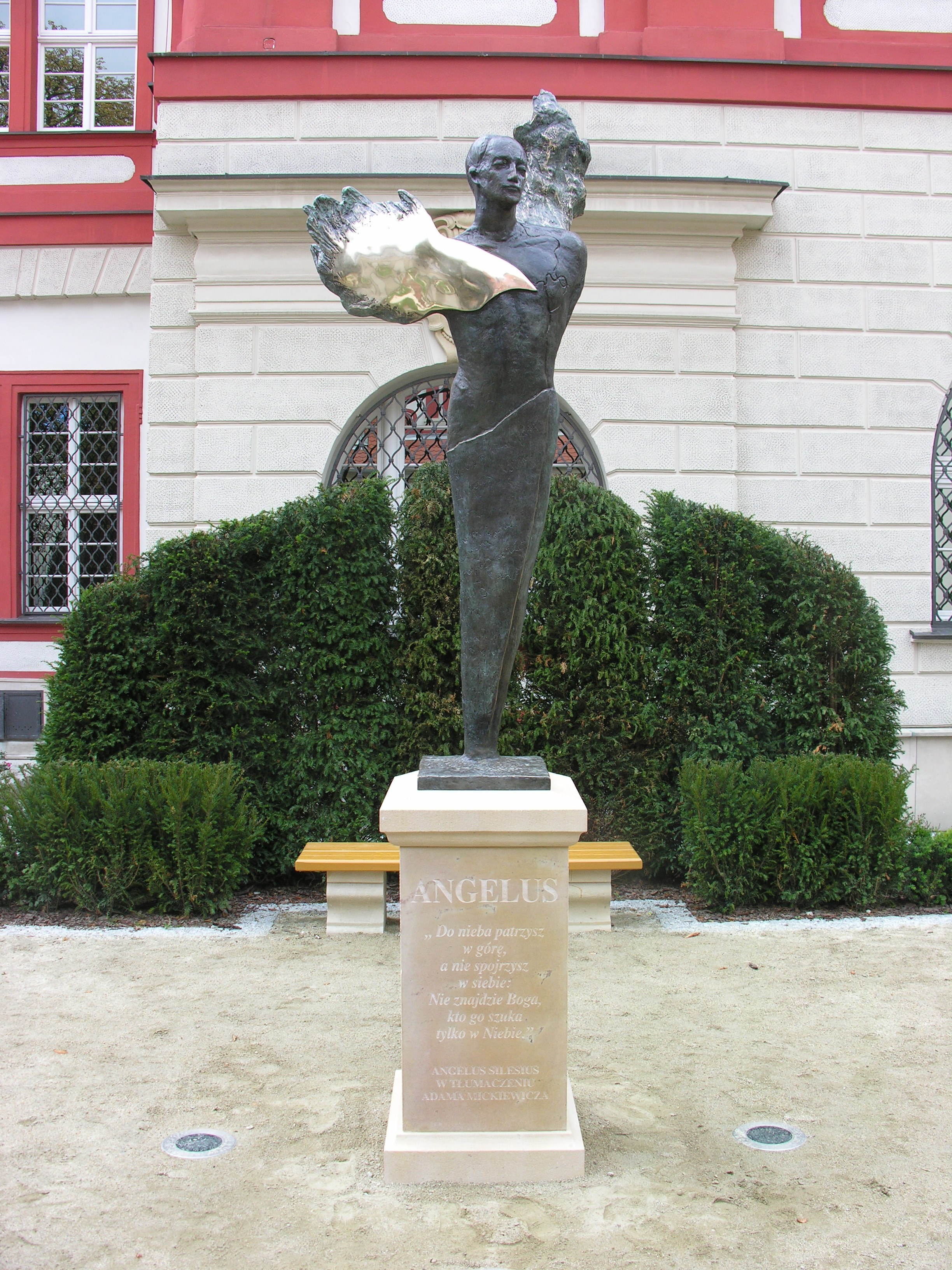 Pomnik Angelusa Silesiusa we Wrocławiu, Zaułek Ossoliński